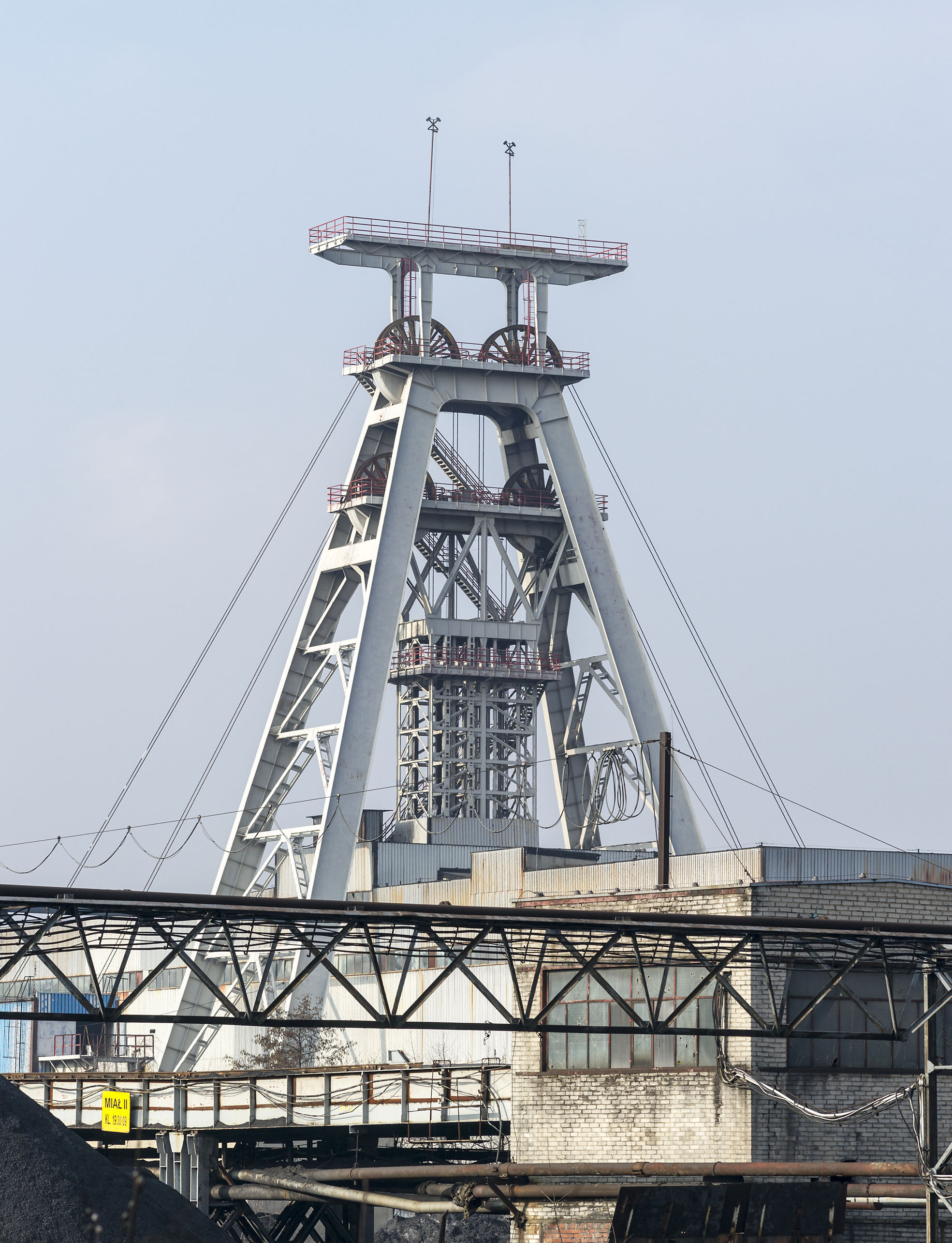 Bergwerk Chwałowice, Rybnik.